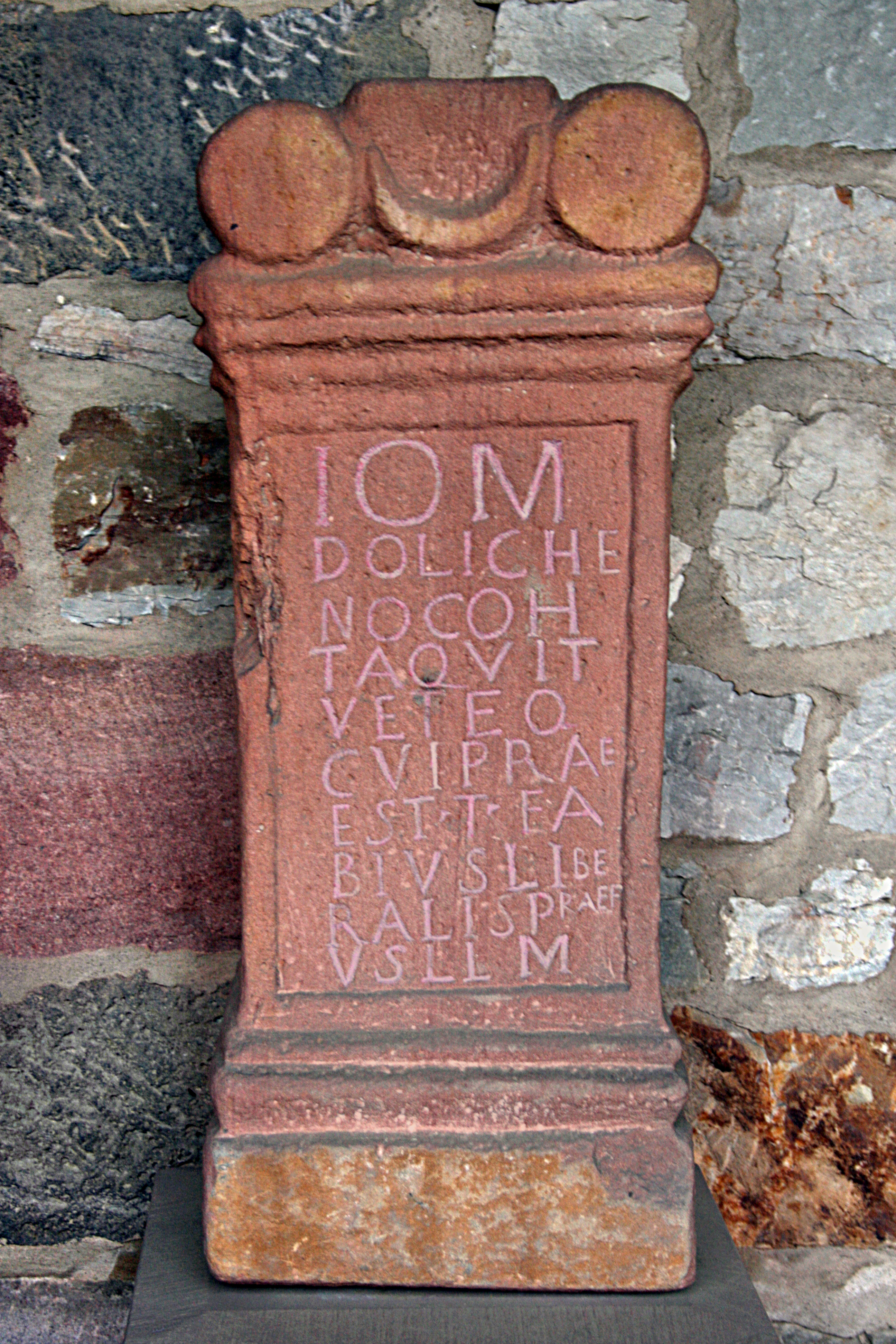 Altar für Iupiter Dolichenus aus Stockstadt, geweiht von der coh. I Aquitanorum vet. eq., ausgestellt im Saalburgmuseum (CIL XIII, 11780).